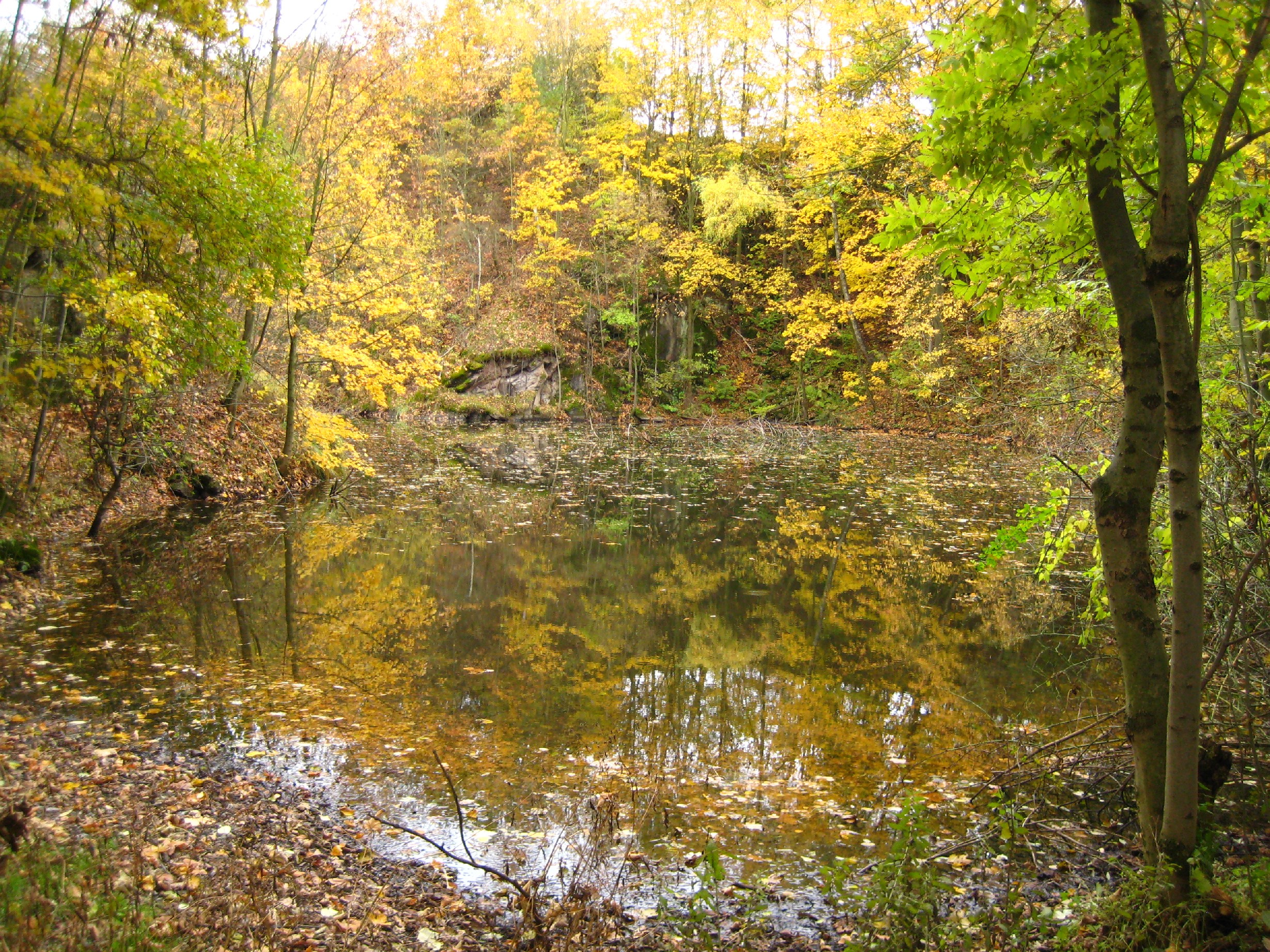 Ehemaliger Kalksteinbruch mit Wasser gefüllt, Landschaftsschutzgebiet „Wildenfelser Zwischengebirge“, Sachsen